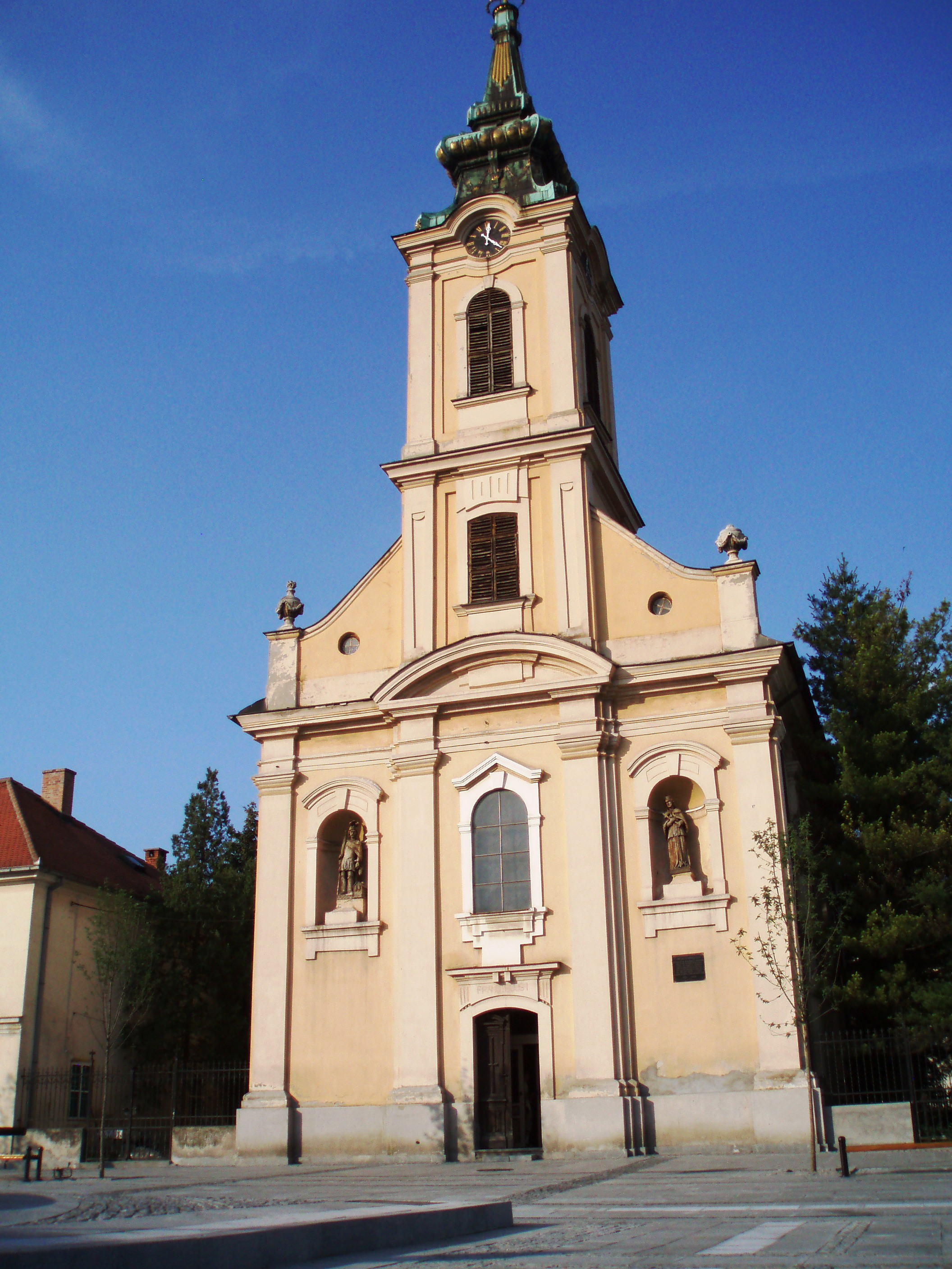 Фотографија цркве Узнесења блажене дјевице Марије у Земуну, аутор:Nicolo